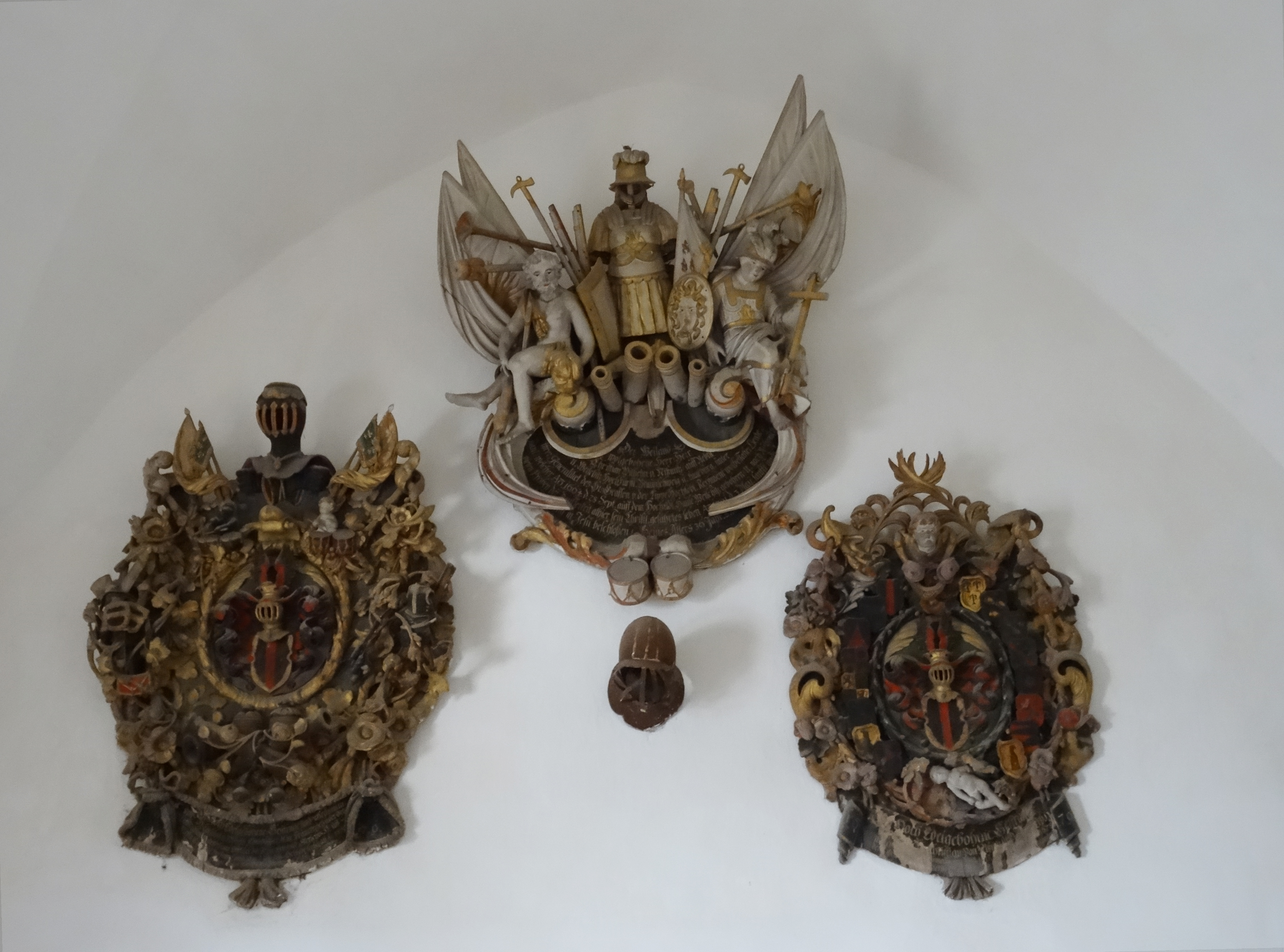 Tafeln derer von Nißmitz in der Georgskirche zu Nebra